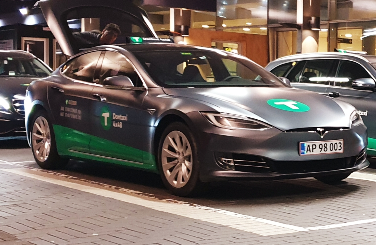 Dantaxi 4x48 Tesla. København 2019.